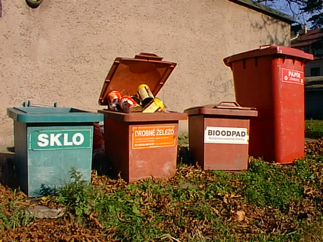 Sběrné hnízdo pro oddělený sběr odpadu v Nové Pace Zdroj: Biom.cz, autor: Antonín Slejška